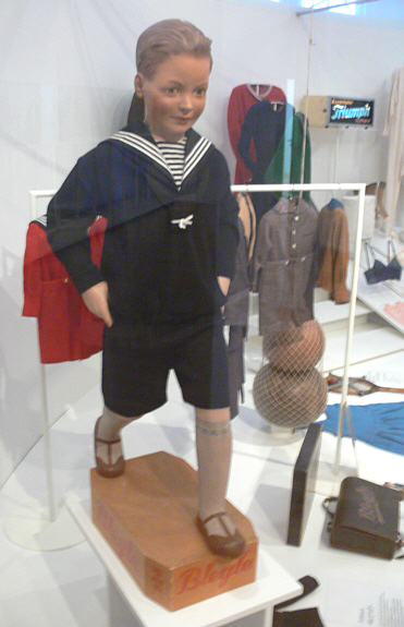 Matrosenanzug Landesmuseum Württemberg (Außenstelle Museum für Volkskultur in Württemberg, Waldenbuch)